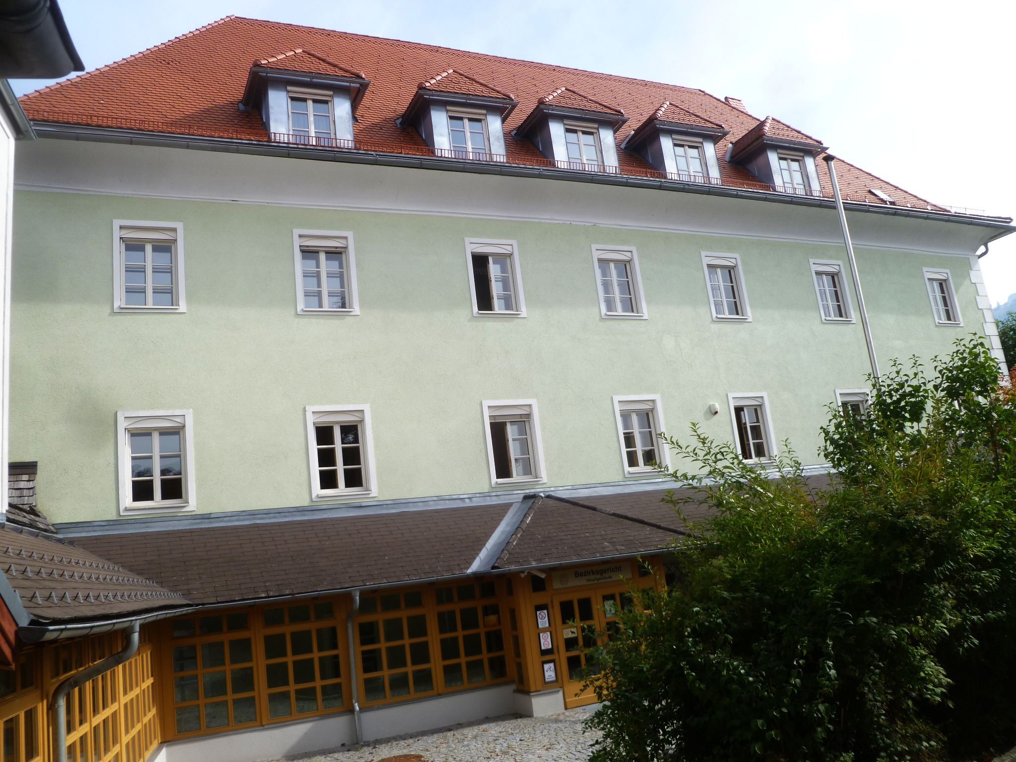 Bezirksgericht, ehem. Schloß Grueb